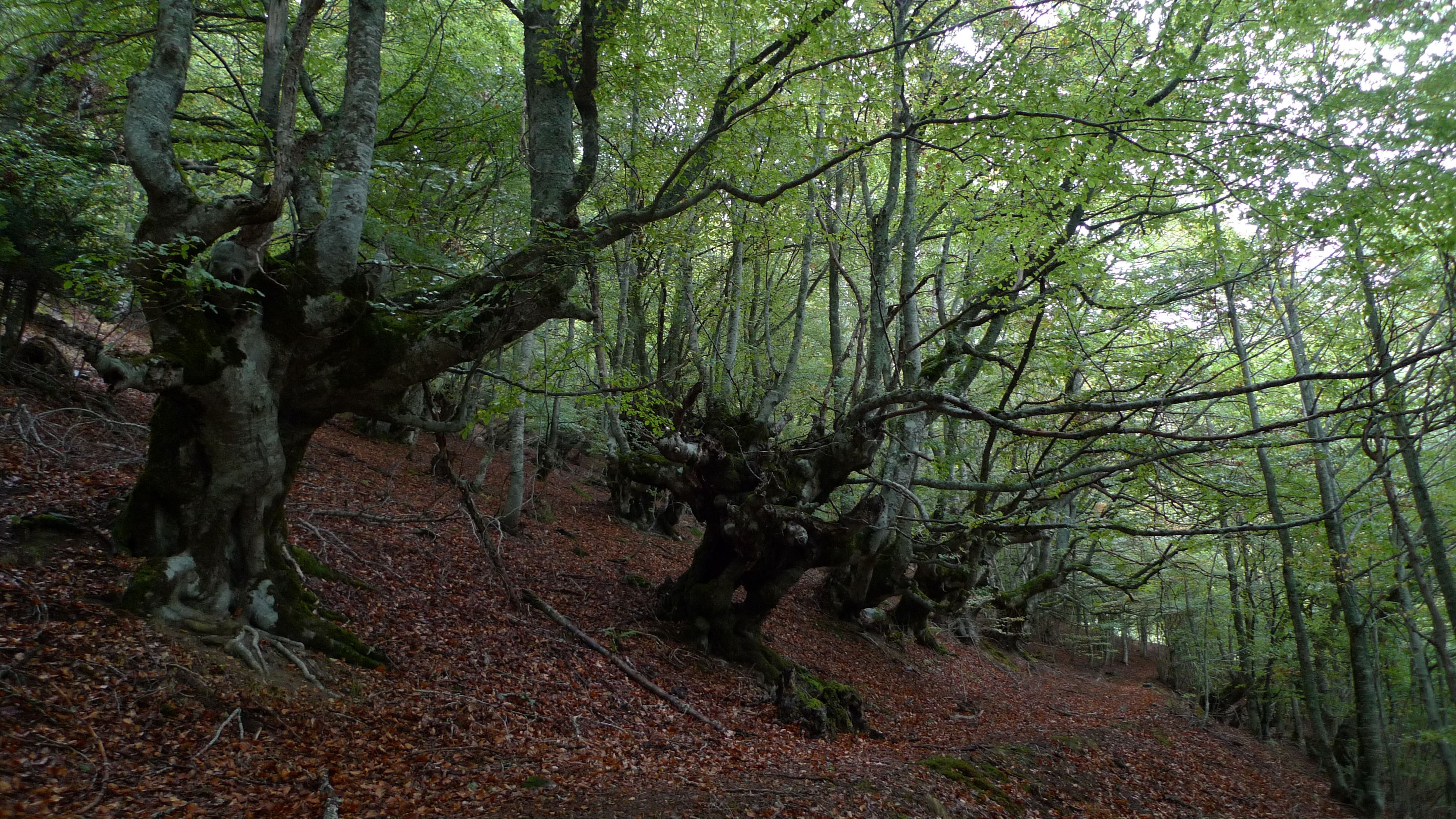 Montanhes de Les e Bossòst (Vall d'Aran) This is a a photo of a natural area in Catalonia, Spain, with id: ES510134